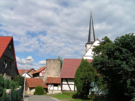 Der Hutturm wurde 88 Jahre wegen des fehlenden Hutes Hutzelturm genannt